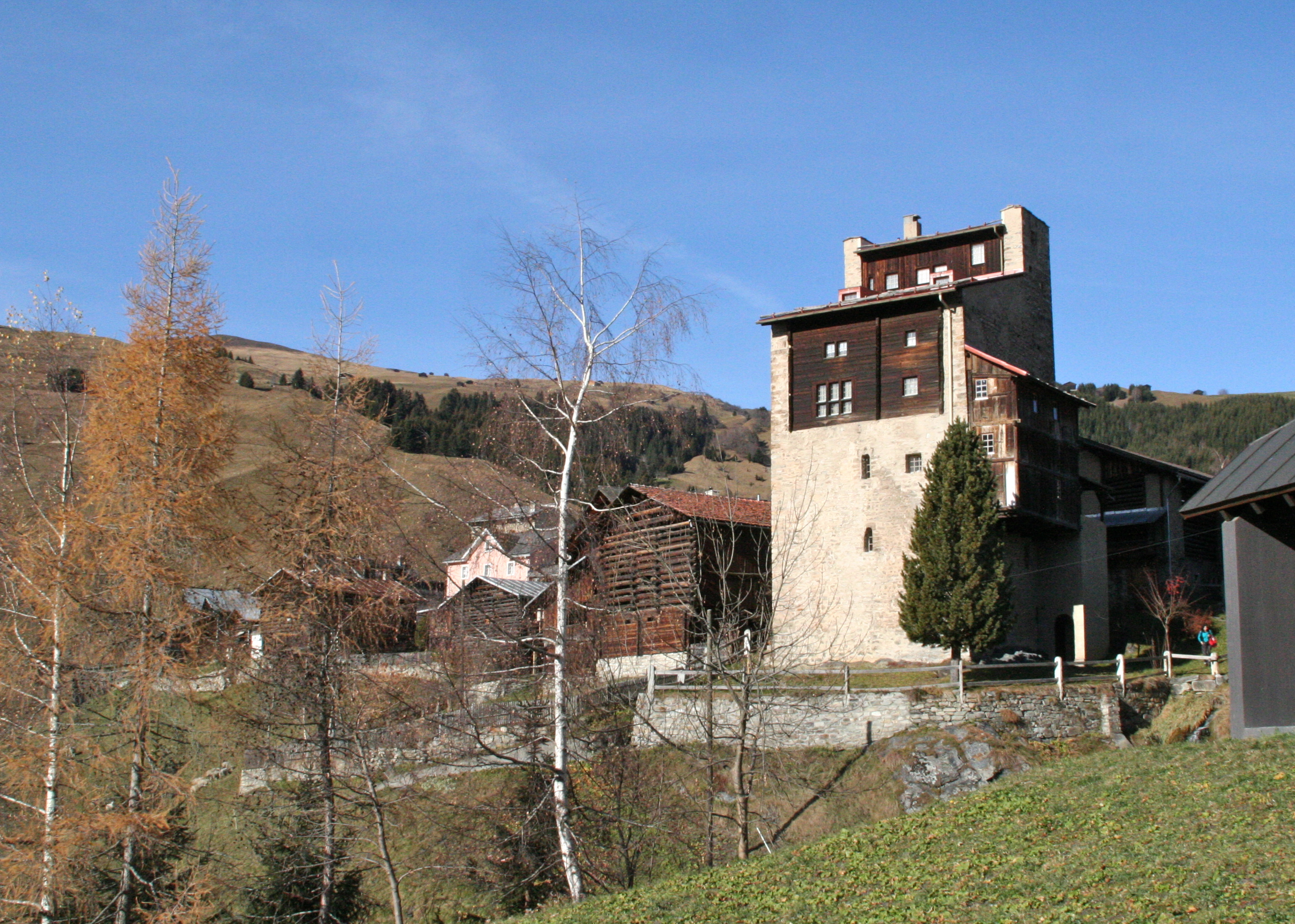 Wohnturm Chisti